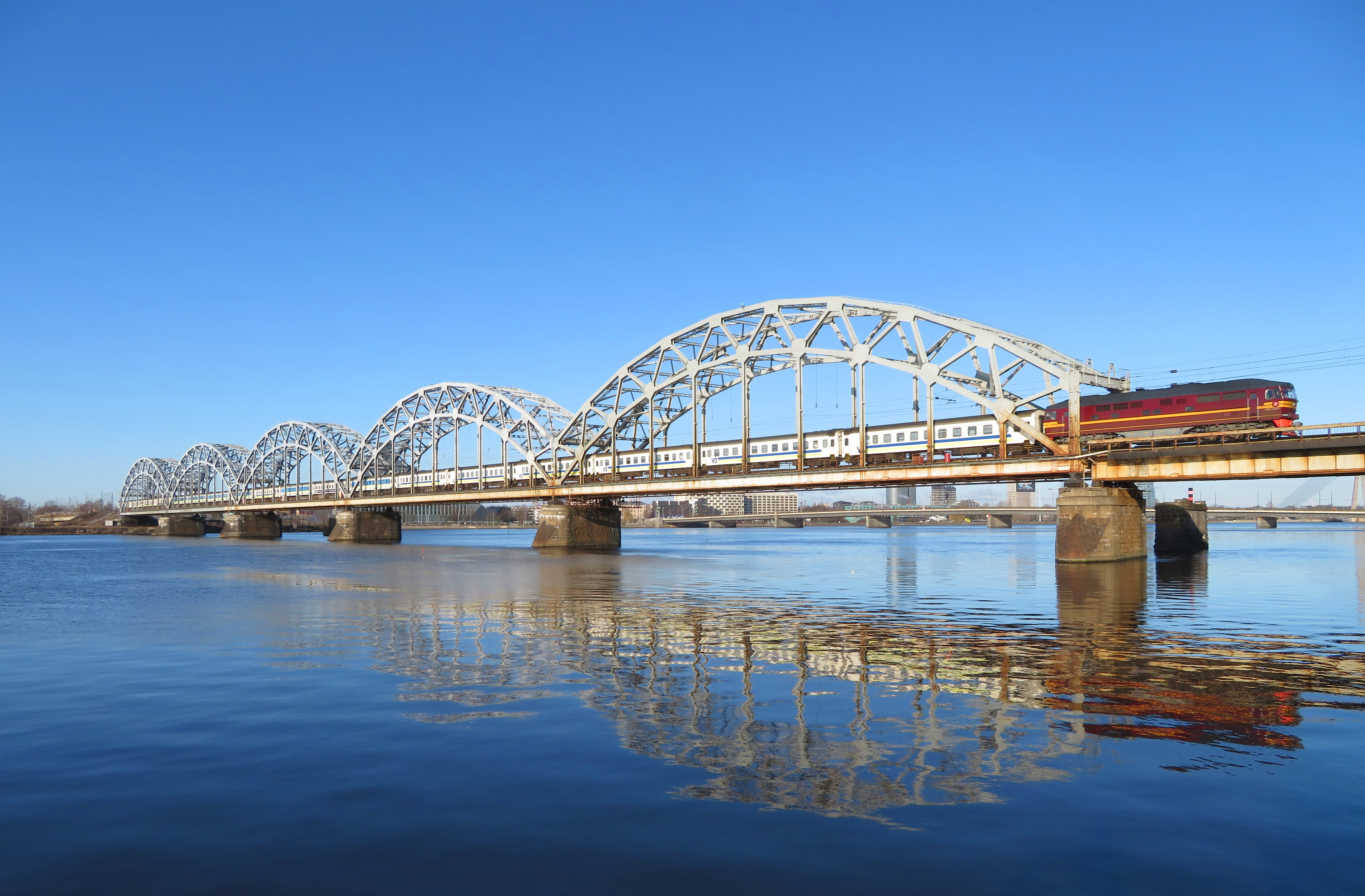 Repatriācijas reiss Kijeva—Rīga